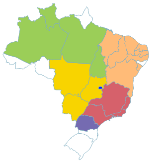 Este ficheiro representa os estados do Brasil nos quais as espécies da família Velloziaceae estão distribuídas.